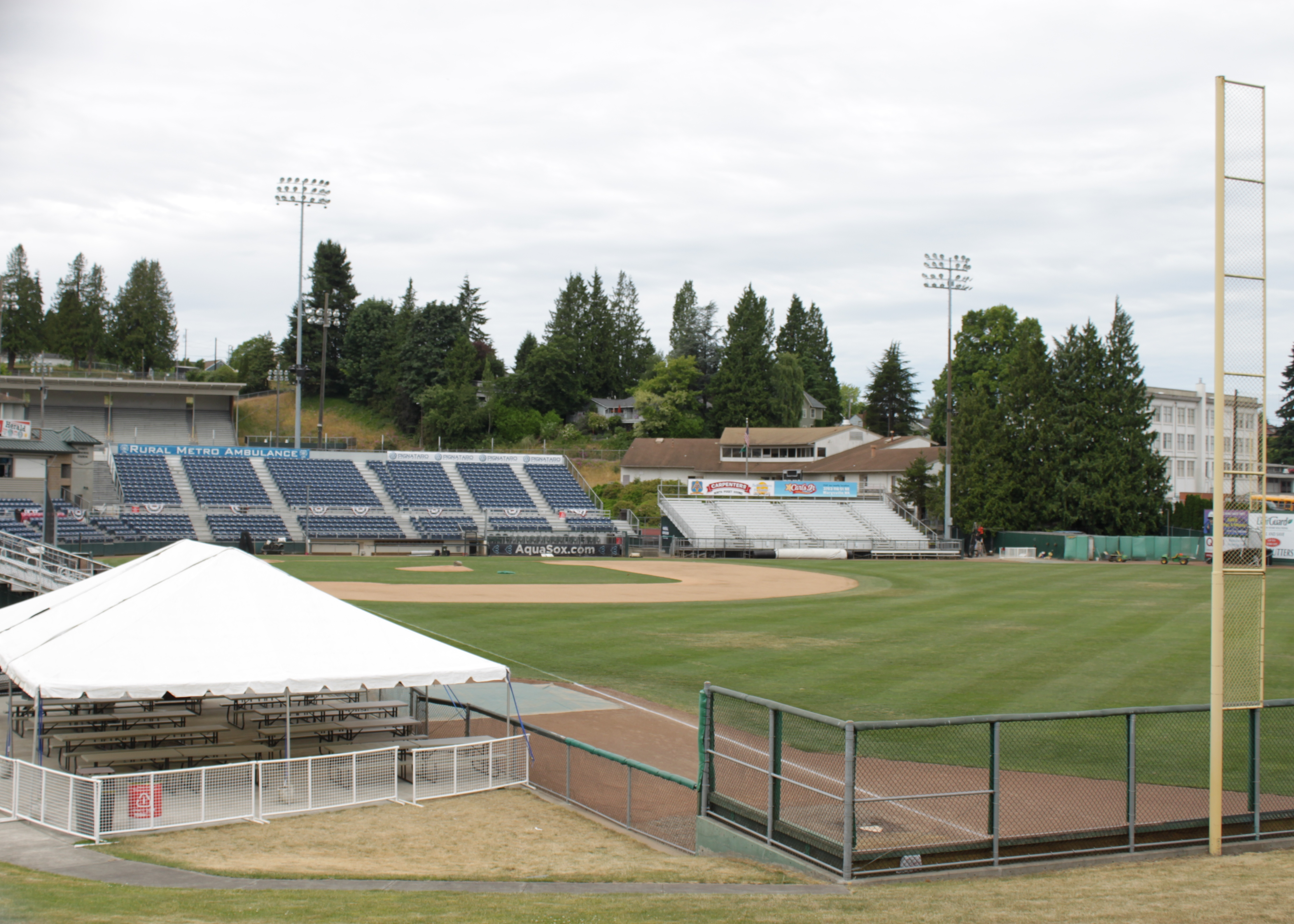 Everett Memorial Stadium baseball field